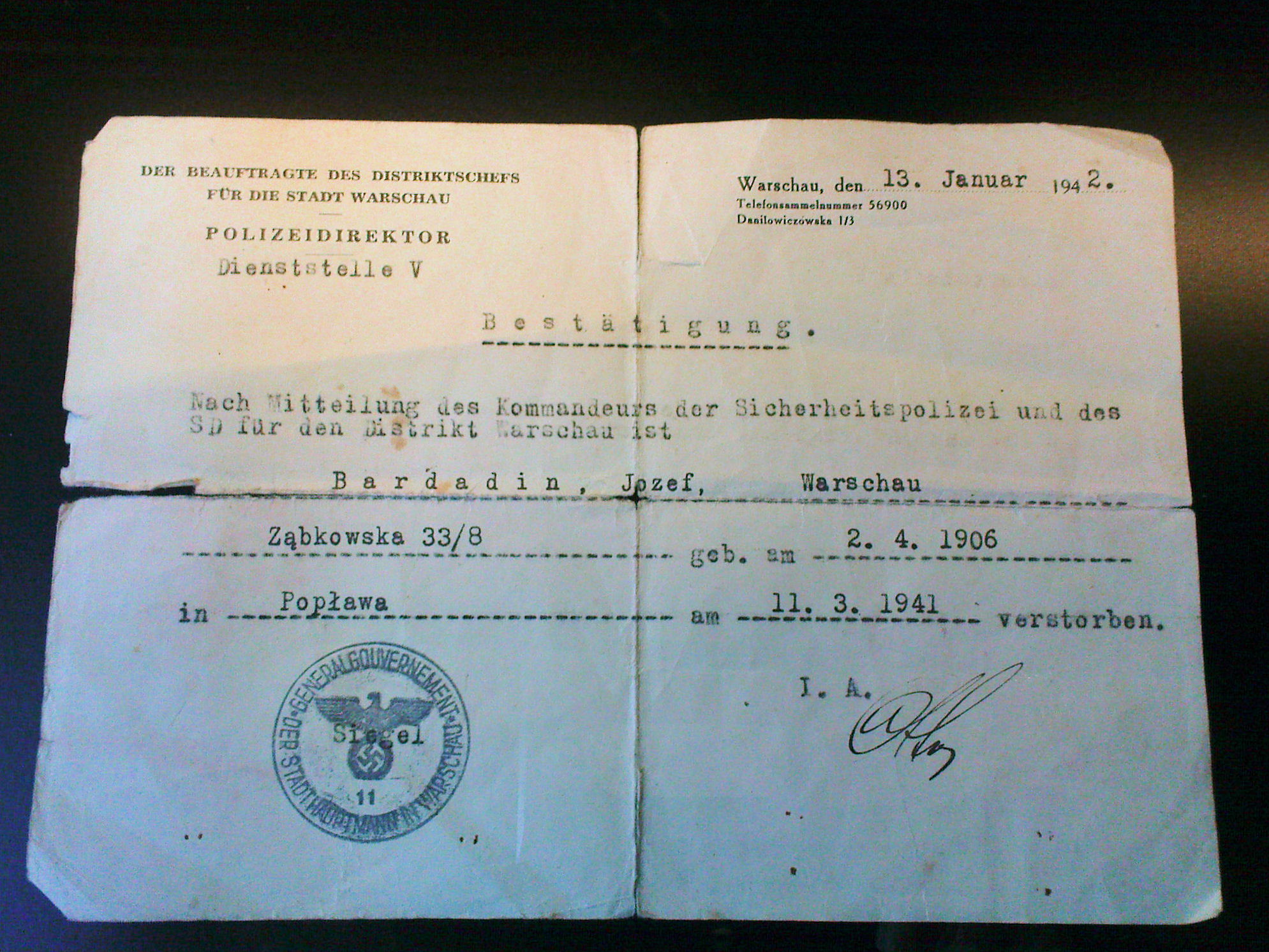 Muzeum wraz z cmentarzem w Palmirach miejscem pamięci narodowej - list zawiadamiający o śmierci wysłany w kilka miesięcy po egzekucji do rodziny zamordowanego